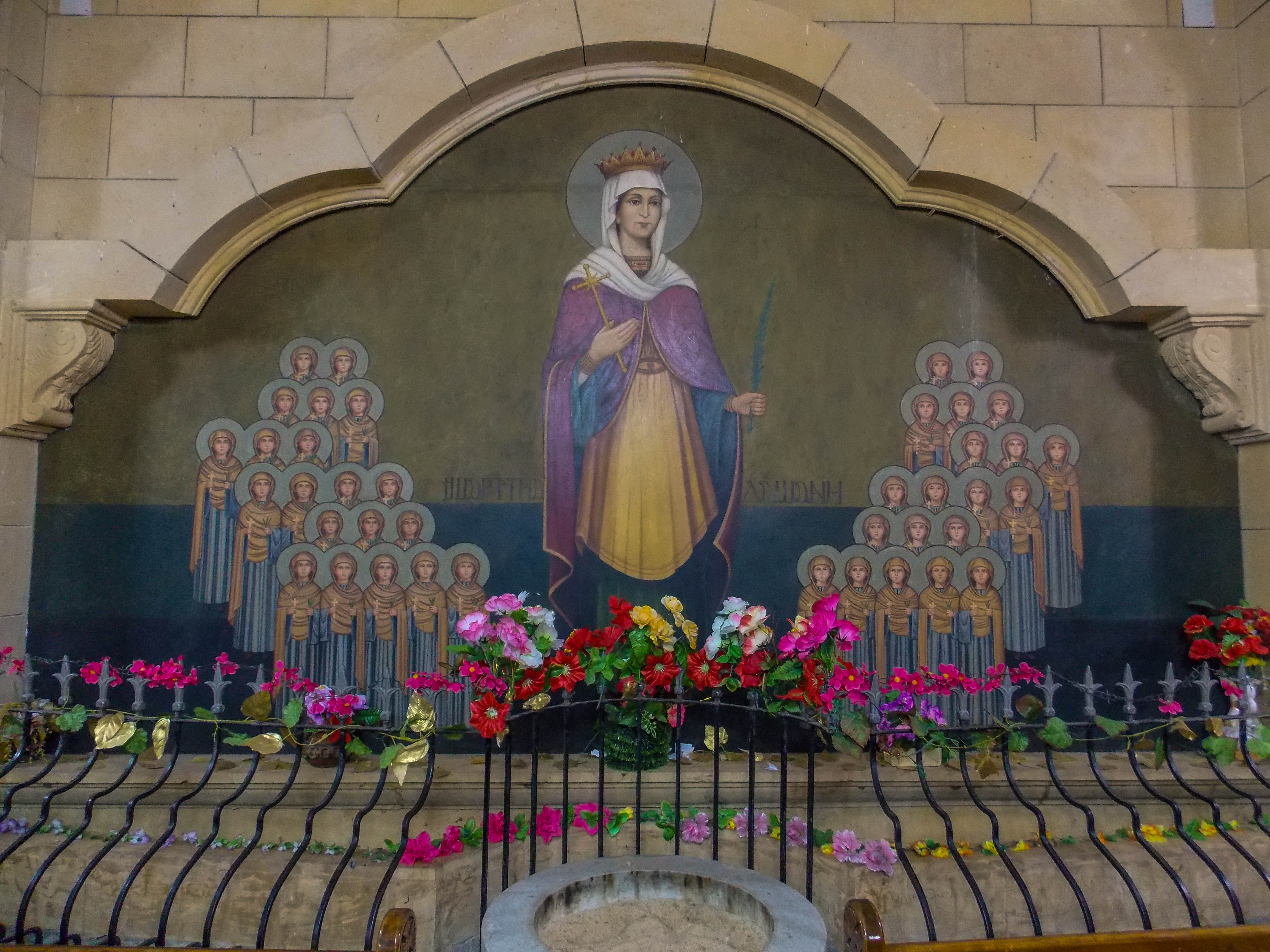 جداريه بدير القديسه دميانه